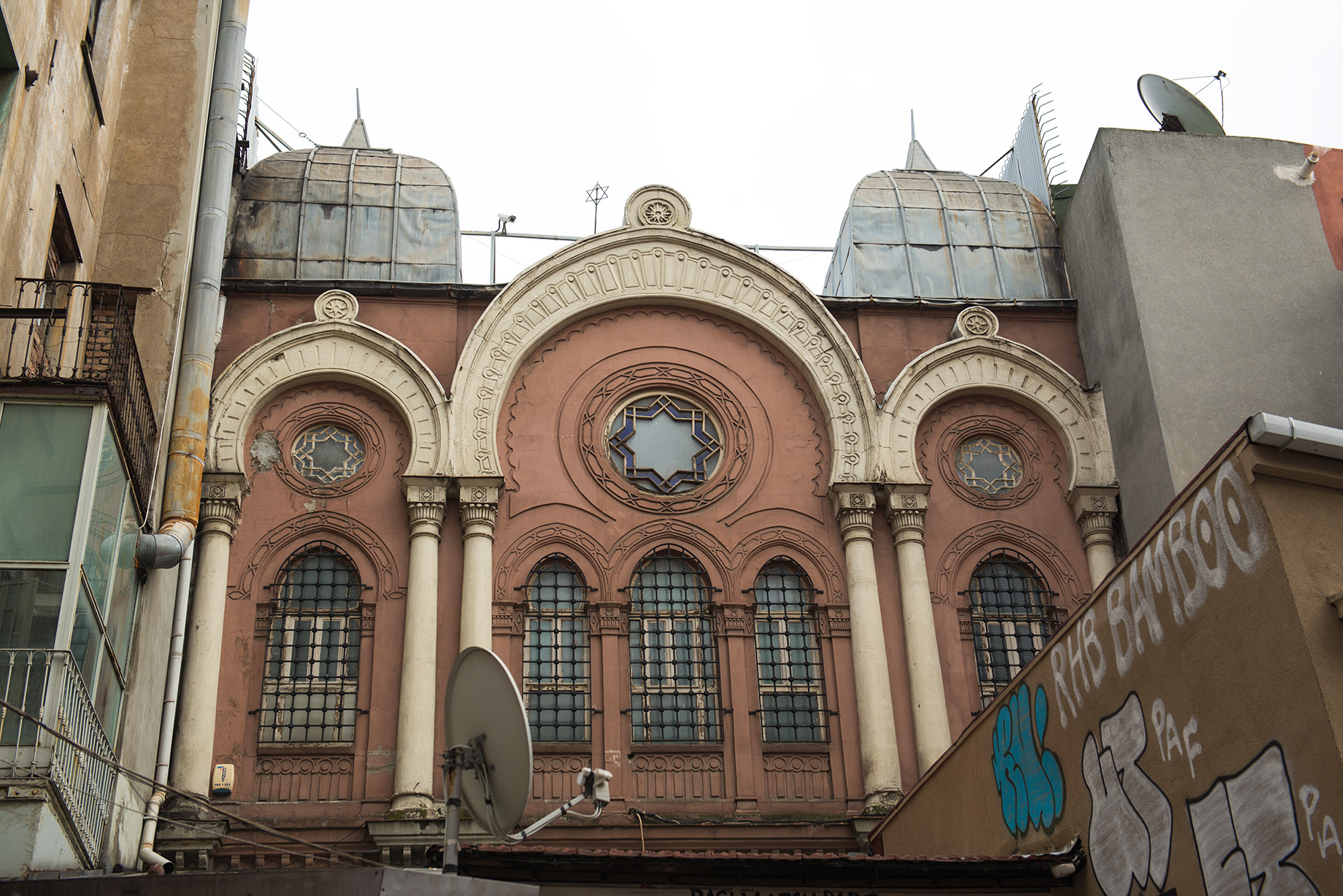 Şınayder Sinagogu